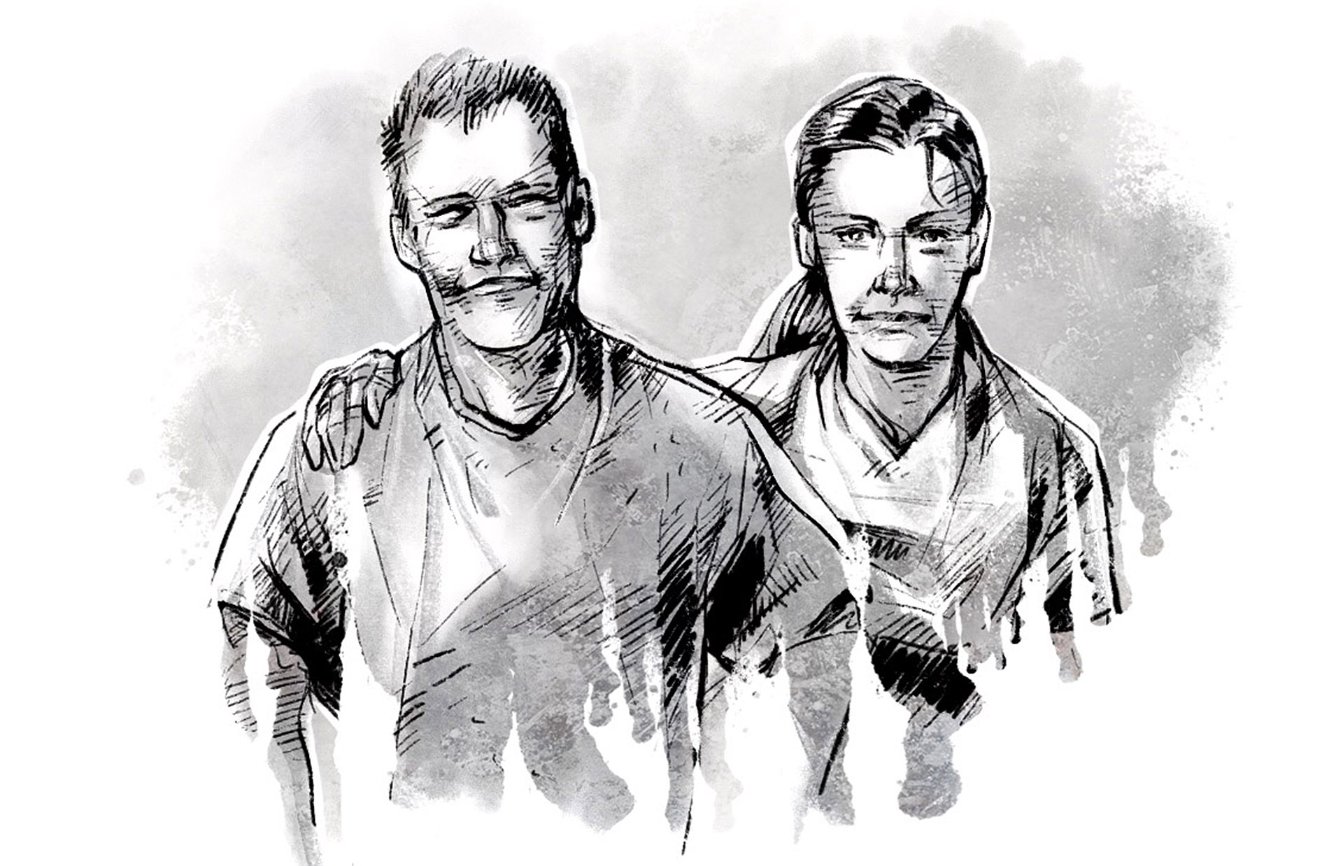 Illustrative Umsetzung der Beteiligten im Mordfall Travis Alexander